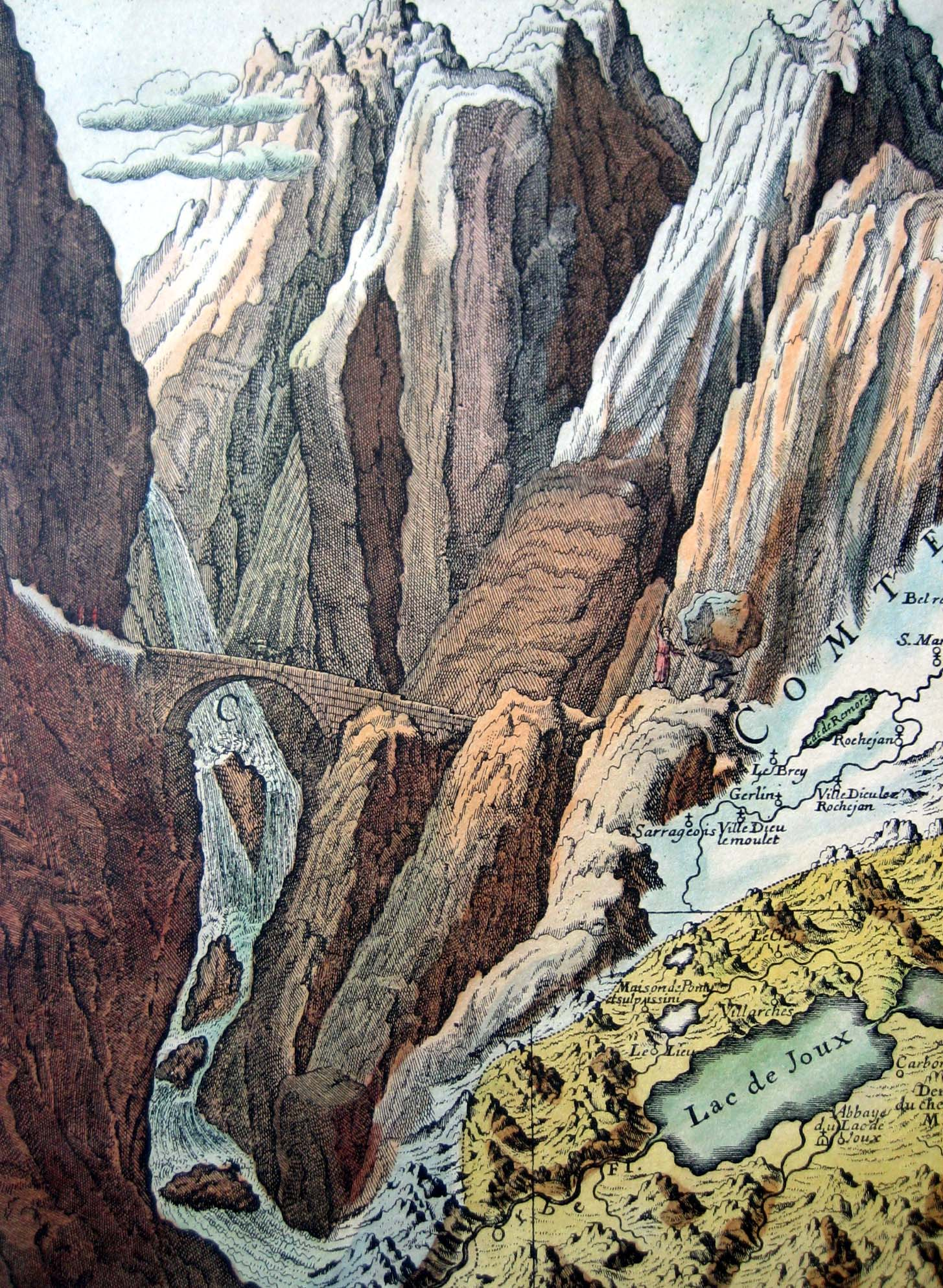 Die Teufelsbrücke. Randbild von Johann Melchior Füssli auf dem handkolorierten Kupferdruck von J. J. Scheuchzers Nova Helvetiae Tabula Geographica von 1712 (linke obere Ecke).